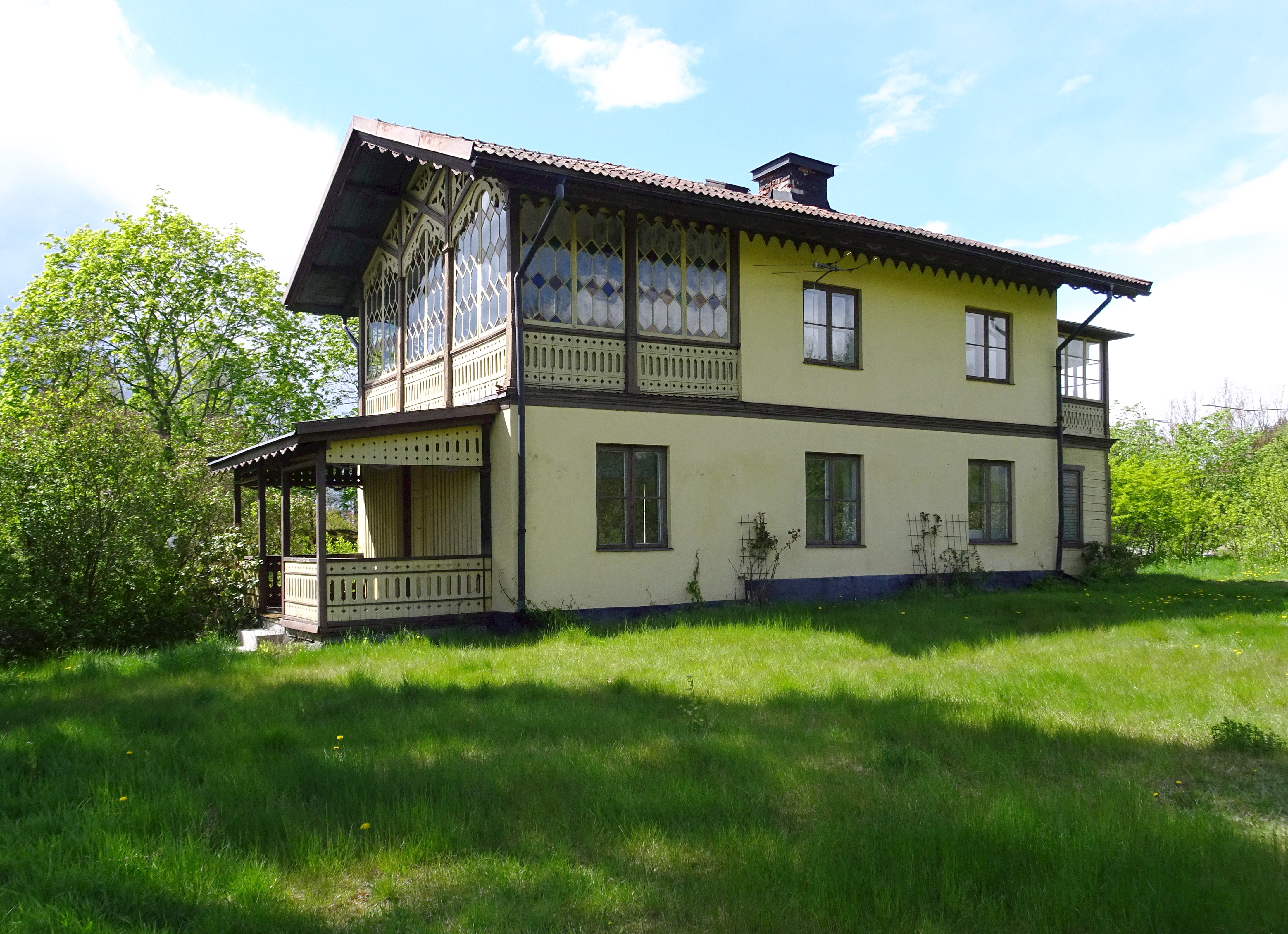 Karlshäll vid norra stranden av Brunnsviken